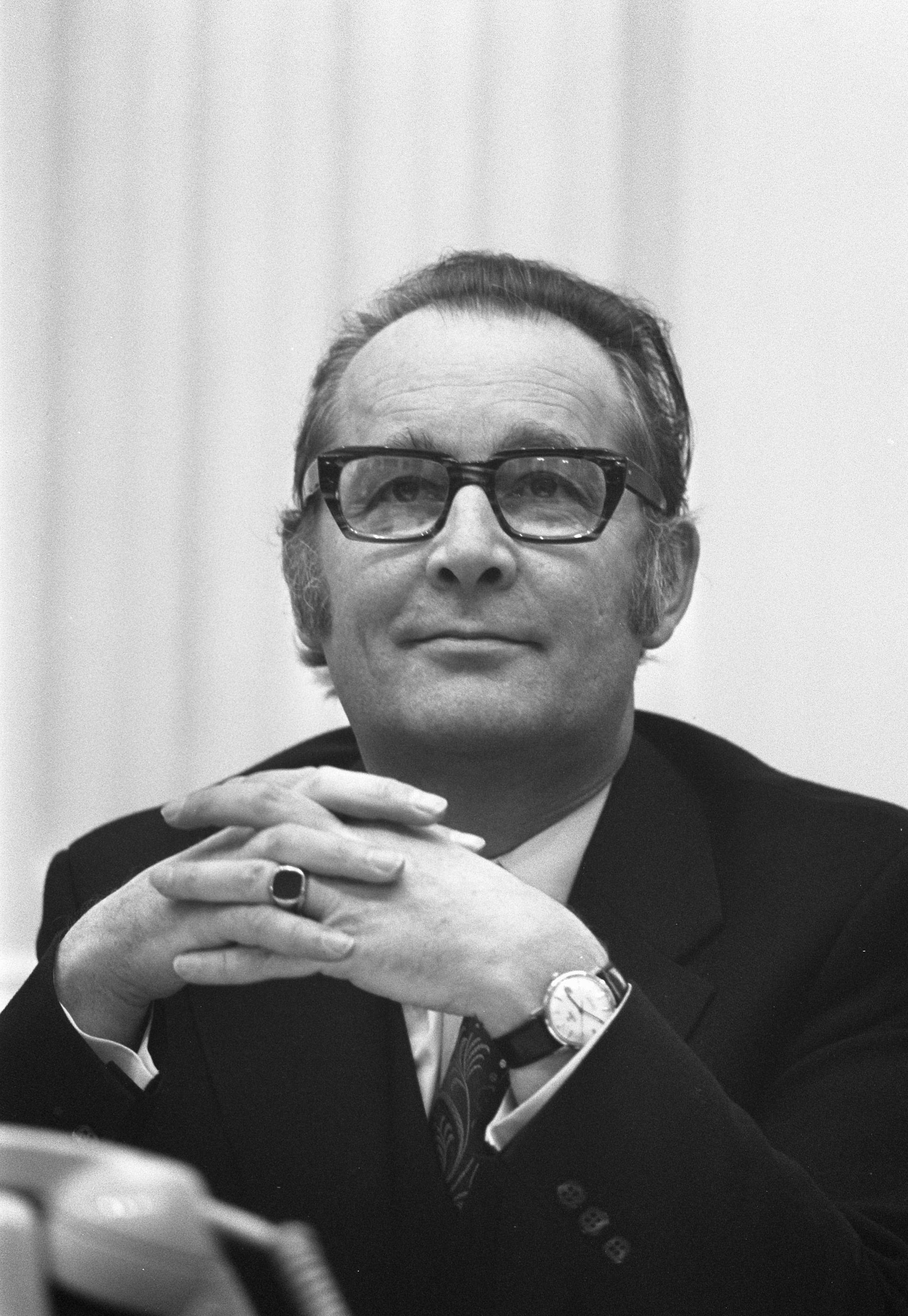 Debat verhoging omroepbijdragen in Tweede Kamer, Minister Engels